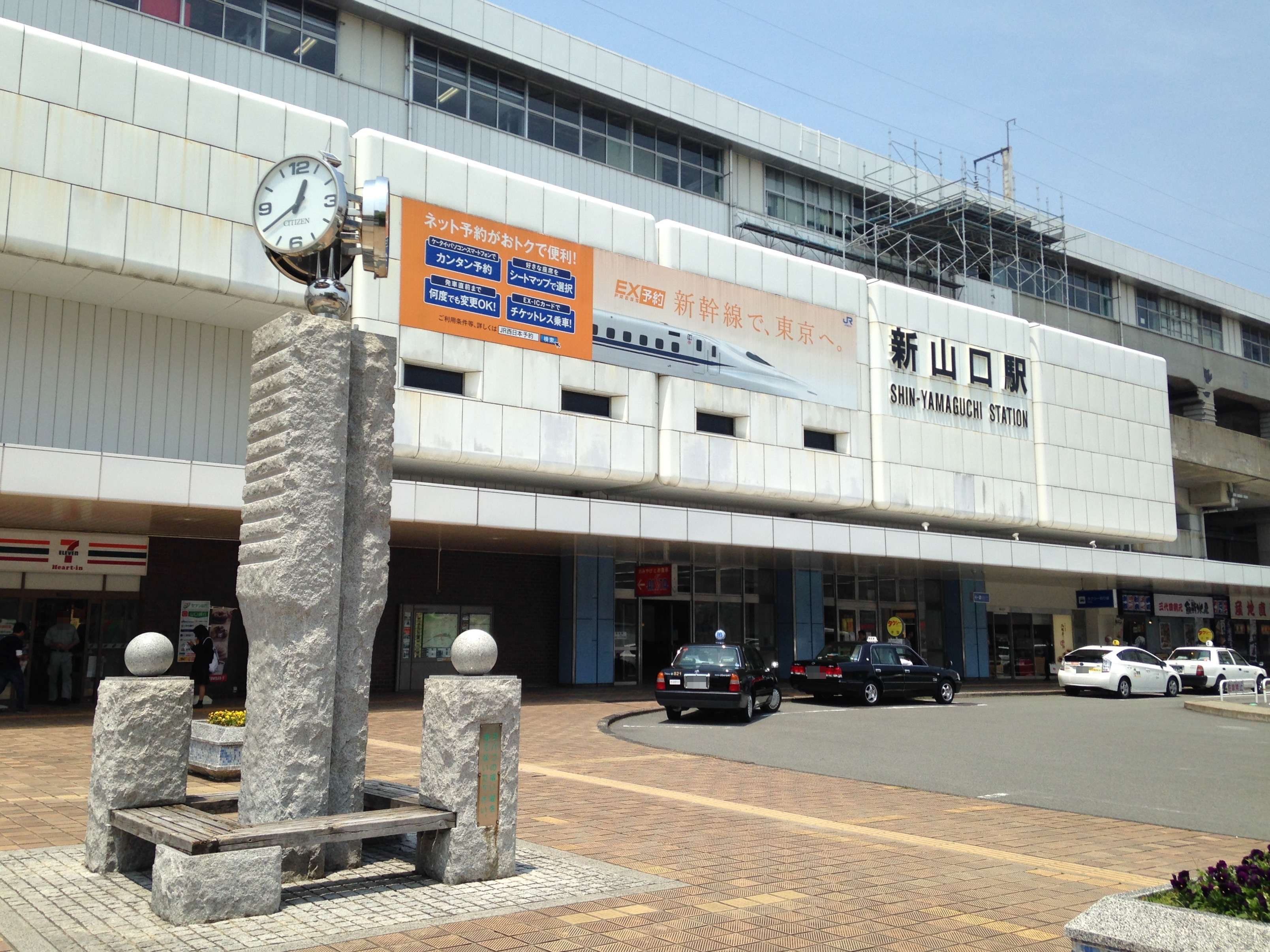 新山口駅の新幹線口